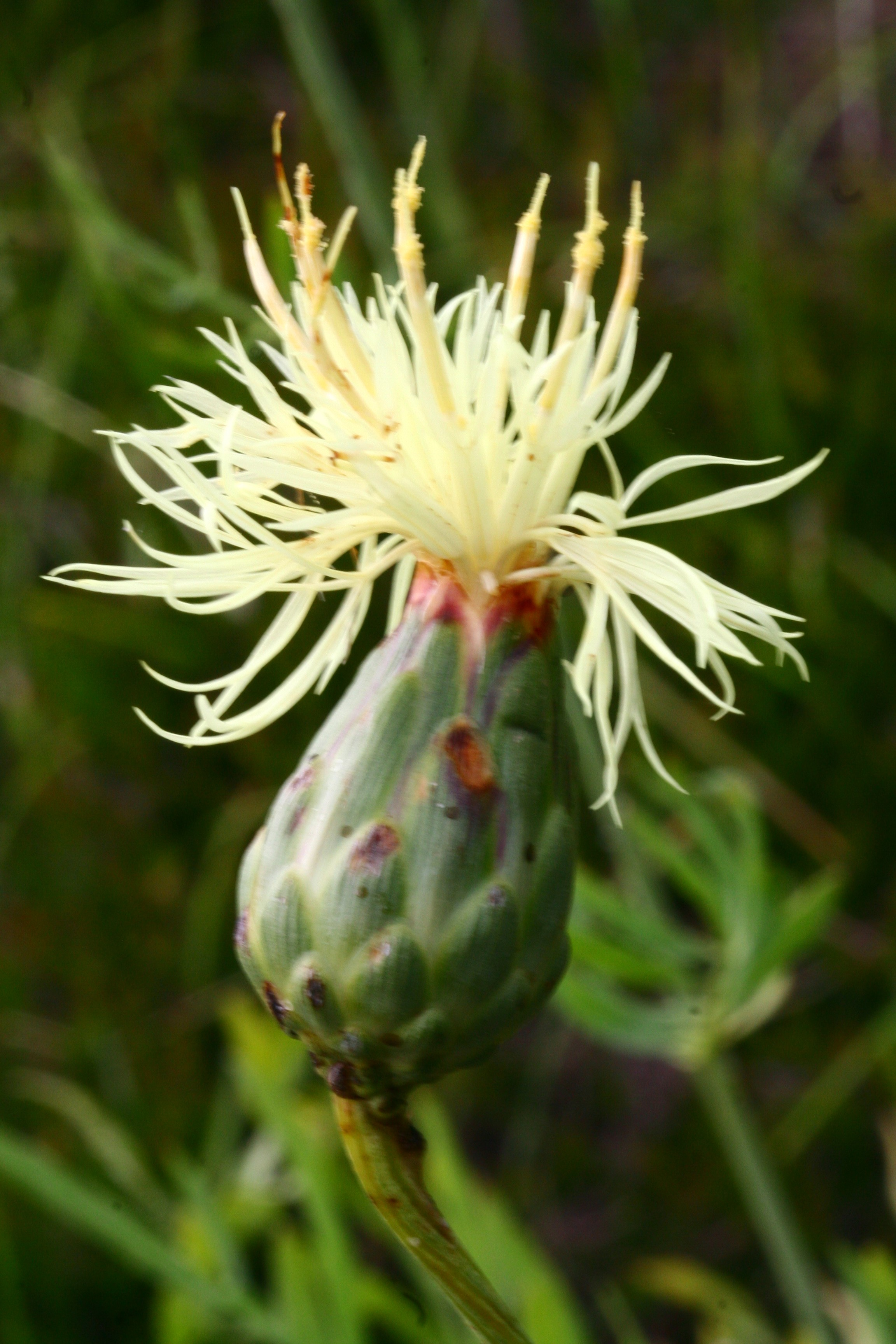 Centaurea alpina - Località: "Giardino Botanico delle Alpi Orientali", Monte Faverghera (BL), 1500 m s.l.m.